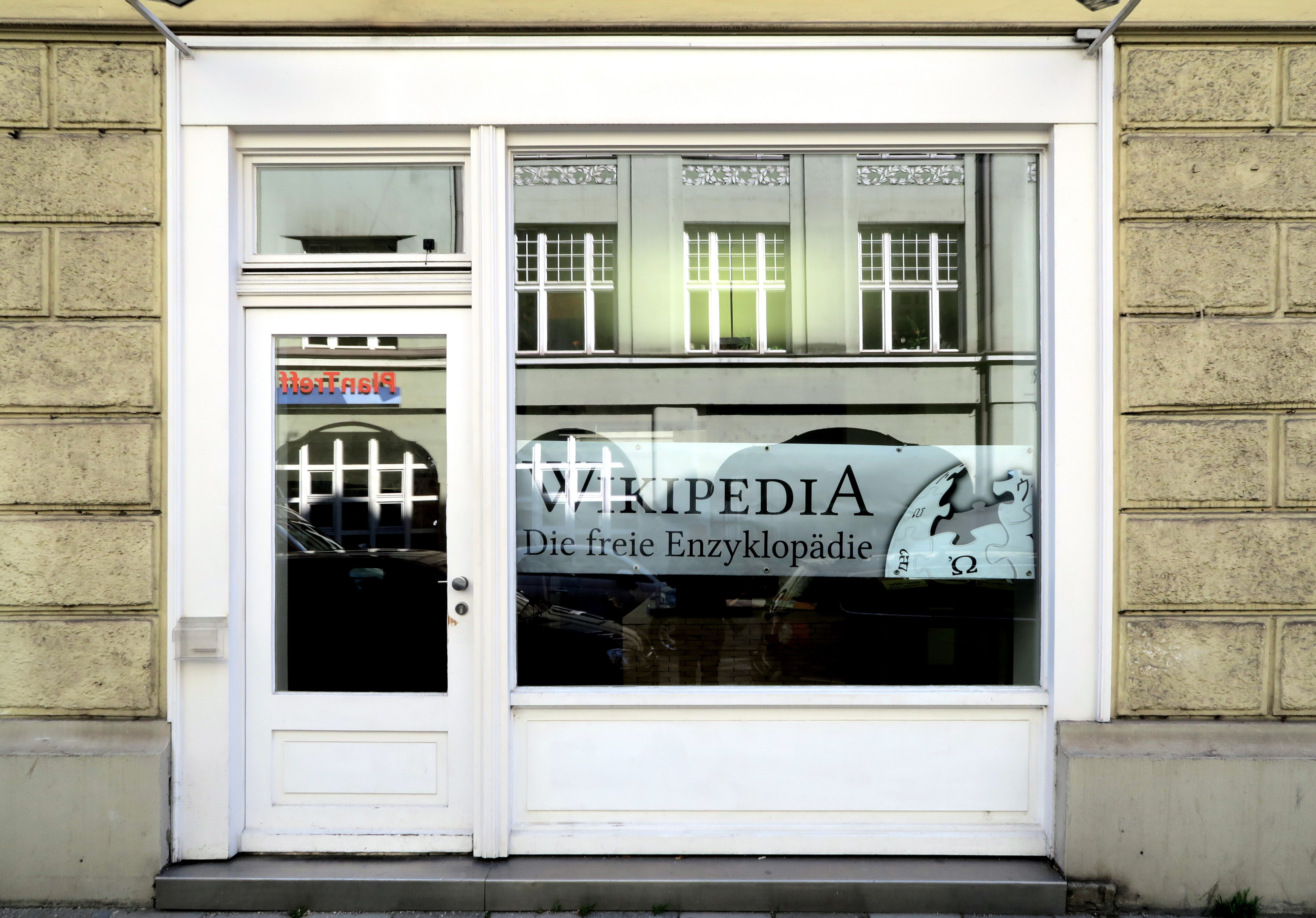 WikiMUC-Standort in der Angertorstraße 3 mit provisorischem Logo von Wikipedia